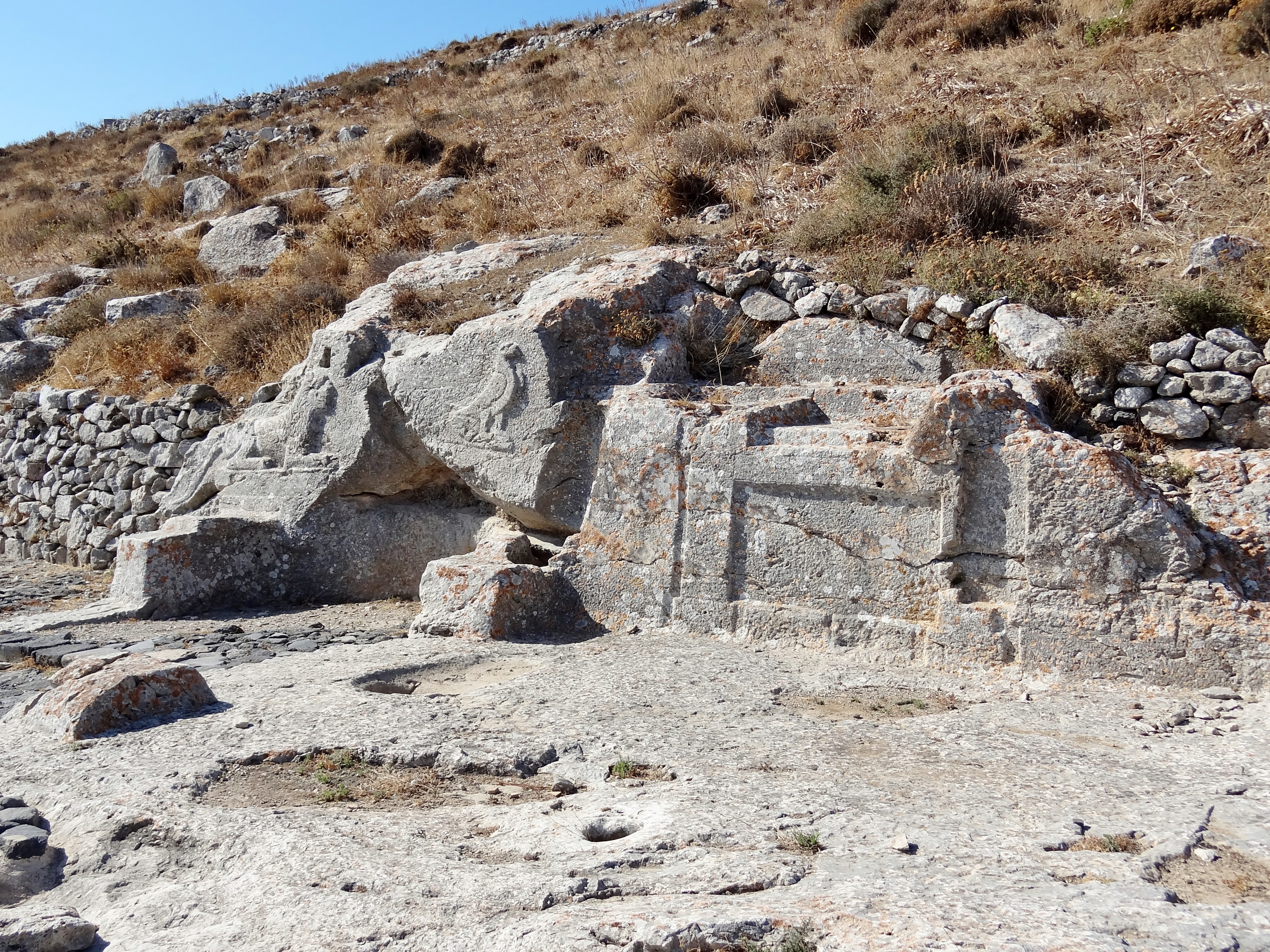 Temenos des Artemidoros in Alt-Thera, Santorin, Kykladen, Griechenland